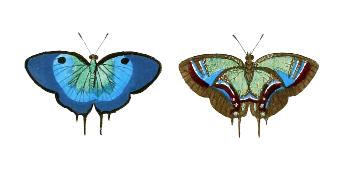 [Papilio] Ganimedes Cramer, "West Indies" (= Suriname), E. de Marre collection = Lamasina ganimedes (Cramer, [1775])